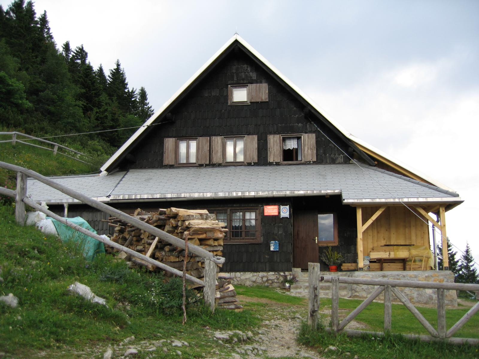 Description: Roblekov dom na Begunjščici. Karavanke mountain range, Slovenia. Author: Matija Podhraški, 12. 7. 2005